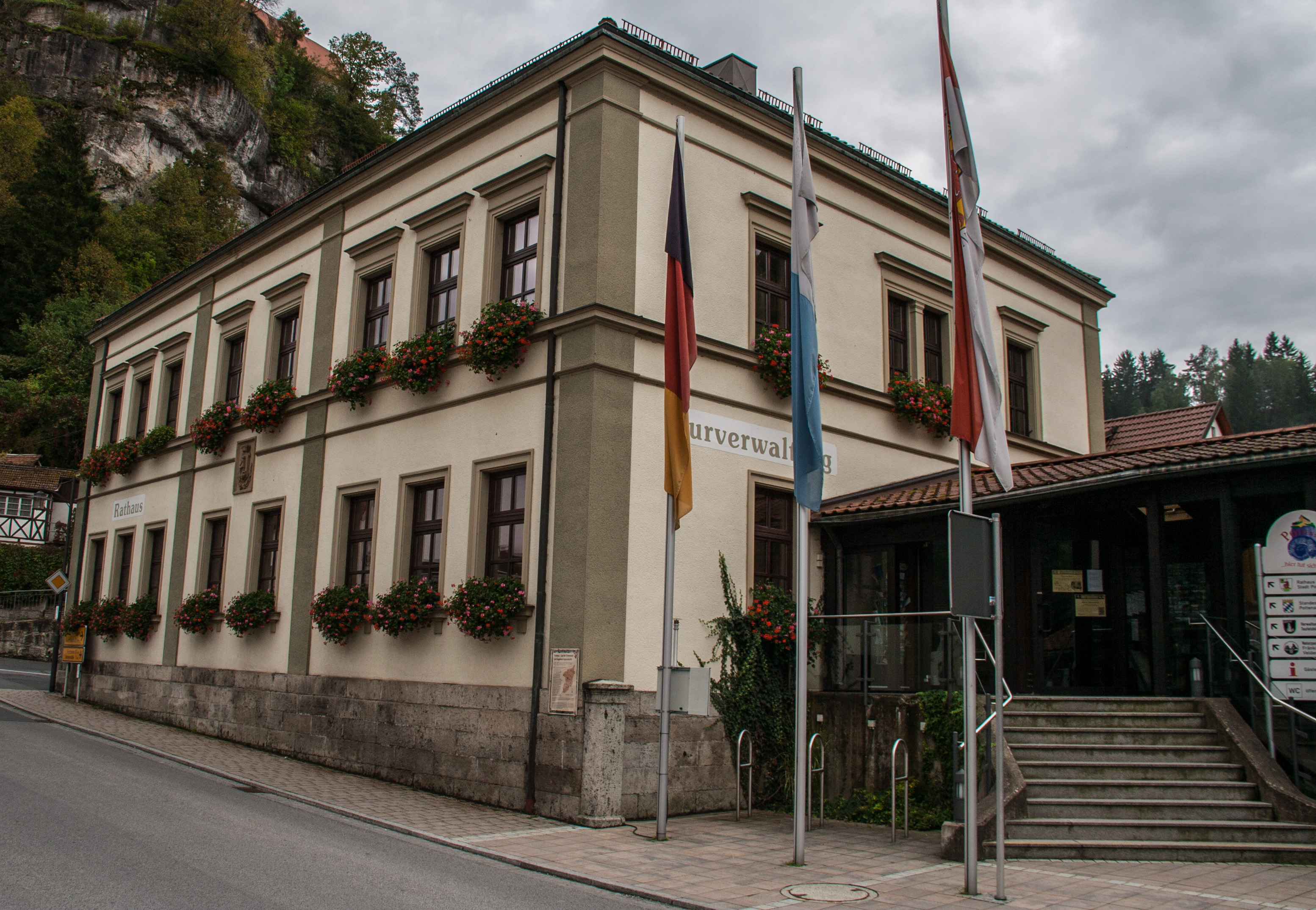 Rathaus Pottenstein (Oberfranken)